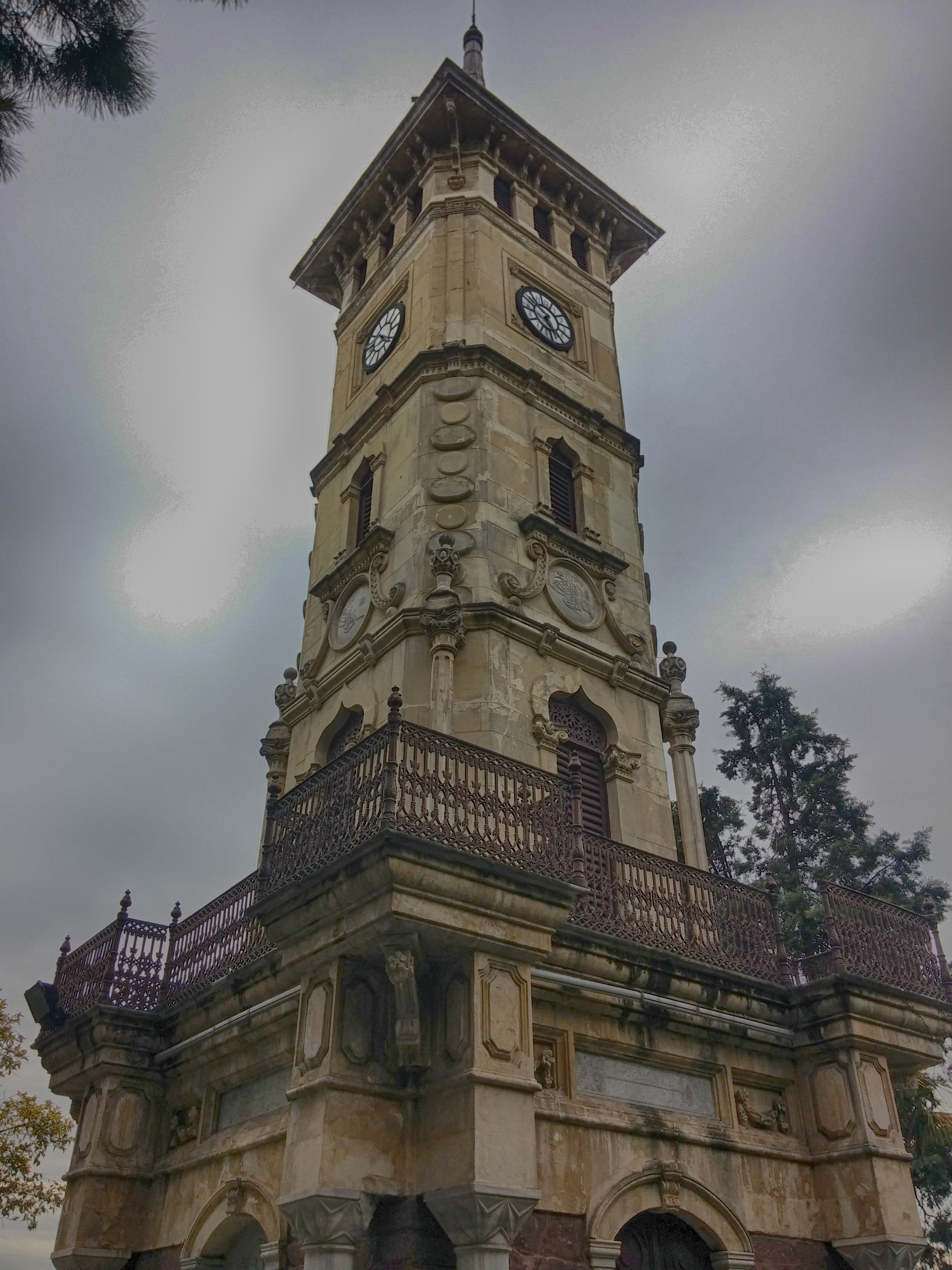 İzmit Saat Kulesi'nin yakından bir görünümü.